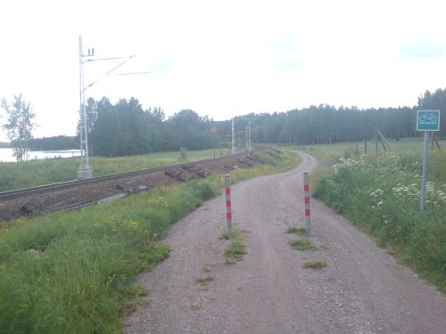 bild från cykelleden runnleden